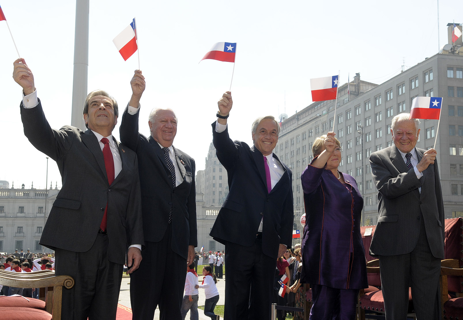 En la intersección de la Alameda con el Paseo Bulnes se realizó la ceremonia del izamiento de la Gran Bandera, que hoy flamea a más de 60 metros de altura. Este evento fue encabezado por el Presidente de la República, Sebastián Piñera, y estuvo marcado por la presencia de ministros, autoridades y los ex Mandatarios del país. Justo en el momento en que el pabellón patrio era izado, una formación de la escuadrilla acrobática de los Halcones de la Fach sobrevolaba el lugar dejando una estela de humo tricolor. Luego de este simbólico acto, el Jefe de Estado recordó la importancia de la bandera a lo largo de nuestra historia e hizo una mención especial a las generaciones futuras. “Estamos trabajando para construir para ellos un Chile lleno de oportunidades, lleno de sonrisas, colores y alegría. Un Chile más libre, más grande y más fraterno. Un Chile con verdadera igualdad de oportunidades. Un Chile en que todos puedan luchar para cumplir sus sueños y alcanzar la felicidad, que es una tarea que está en el alma del destino y la misión de cada uno en este mundo”, señaló.